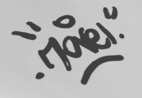 İzmir sokaklarından bir tag